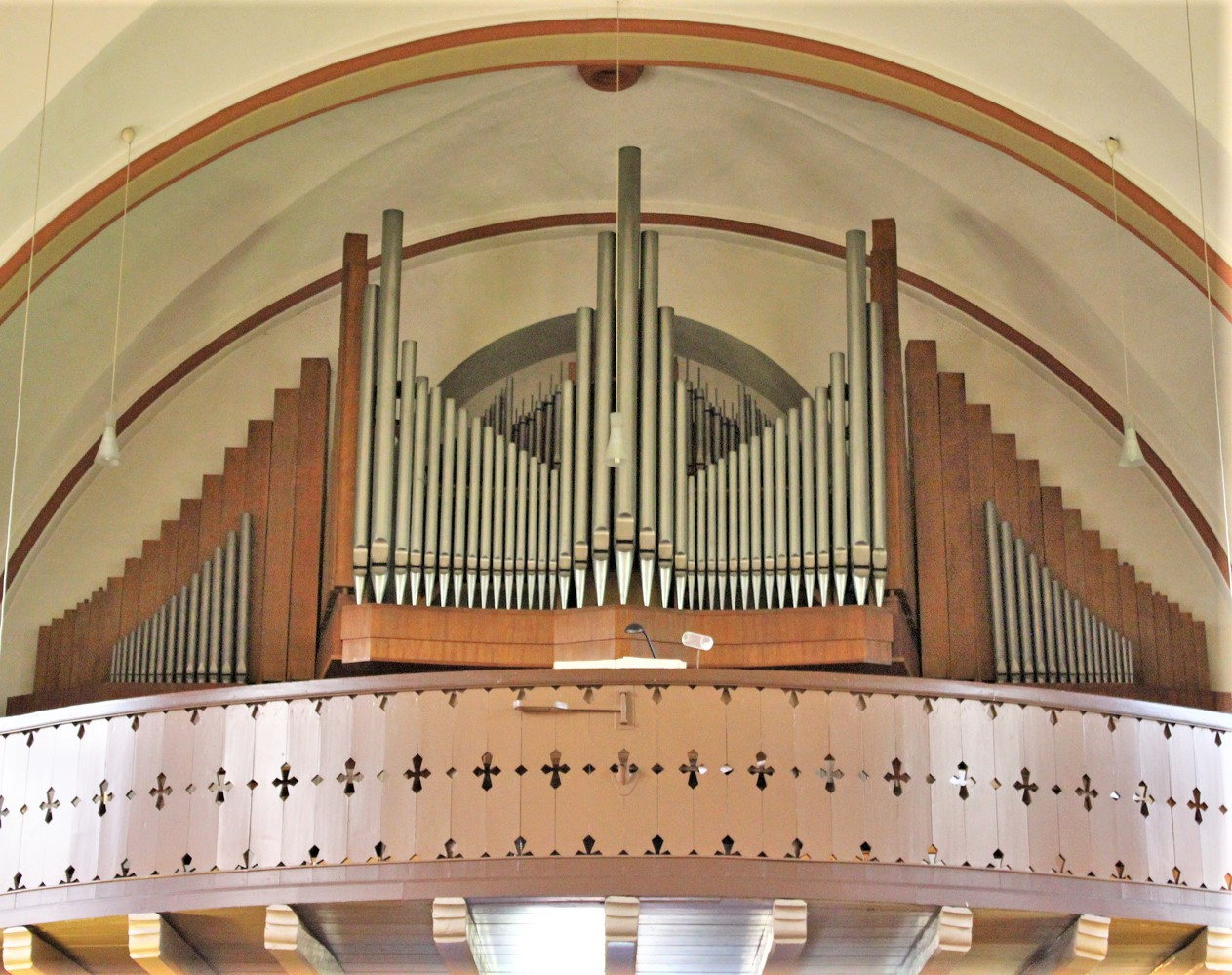 Orgelprospekt der kath. Kirche St. Laurentius in Wolfersweiler, Gemeinde Nohfelden, Landkreis St. Wendel, Saarland